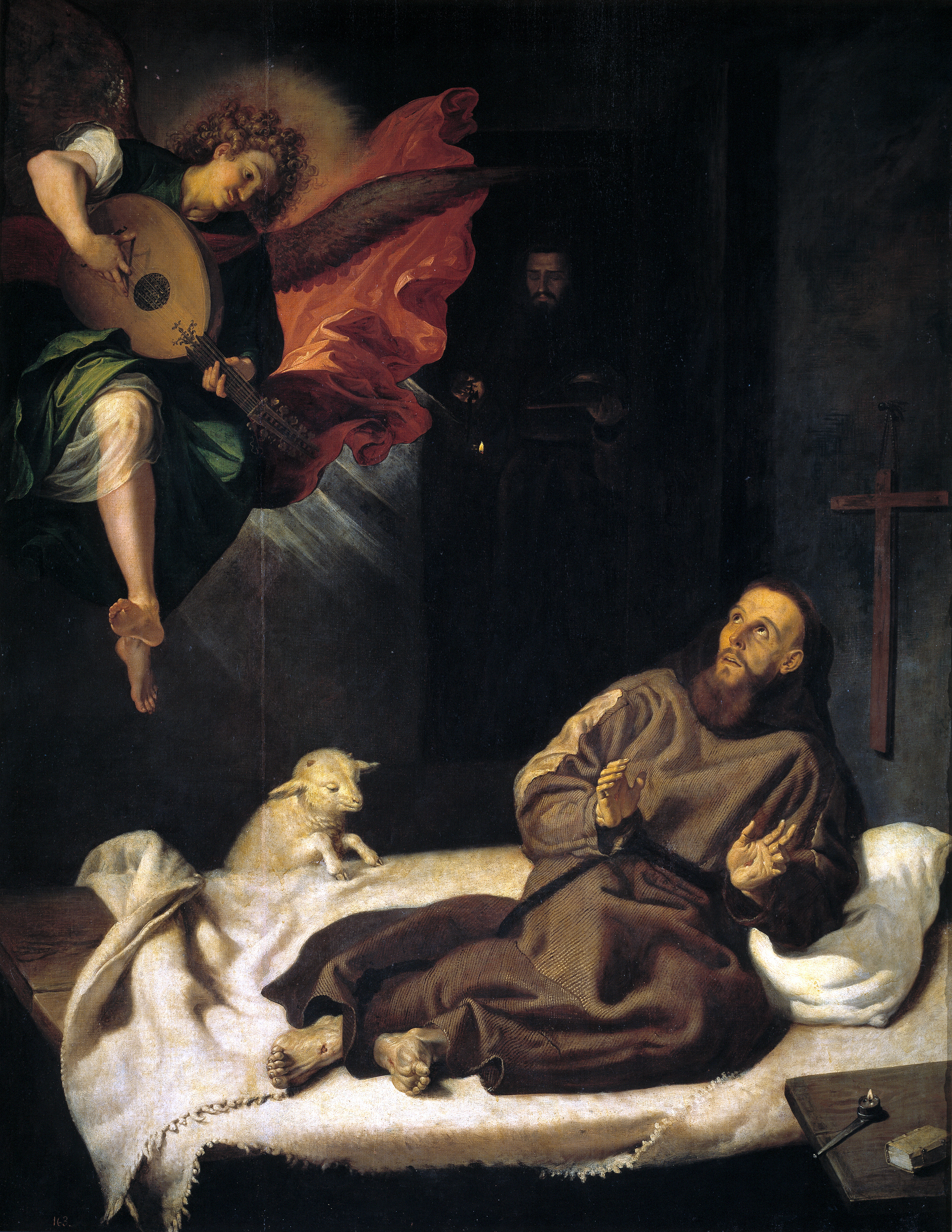 La obra representa a San Francisco de Asís, fundador de la Orden de los franciscanos, siendo confortado por un ángel que porta un instrumento.